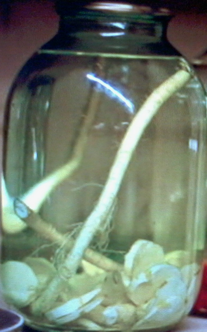 Знято мобілкою Самсунг